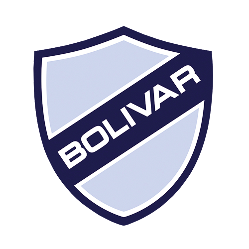 Club Bolívar, escudo oficial